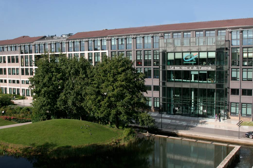 Le nouveau siège du Crédit Agricole. Campus Evergreen à Montrouge (92).